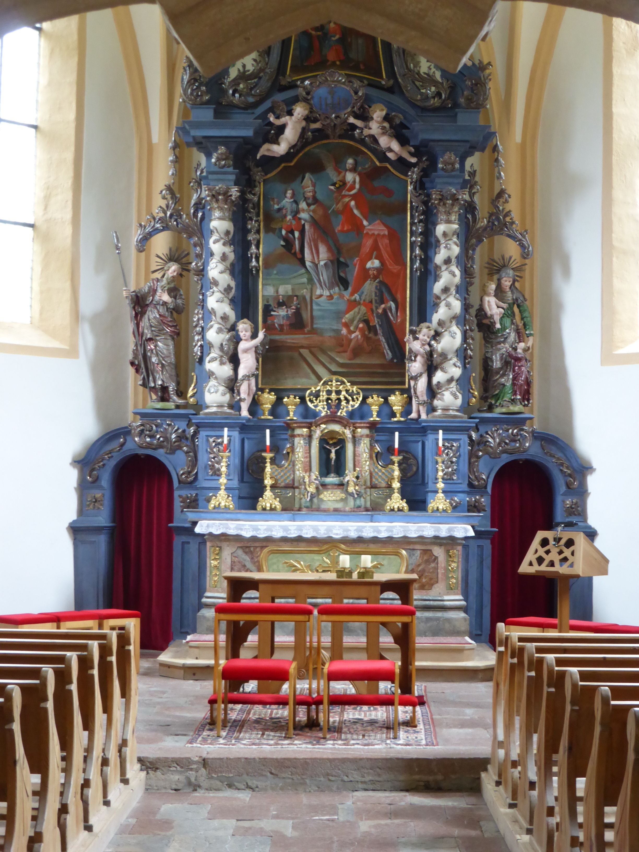 Kath. Filialkirche hl. Nikolaus